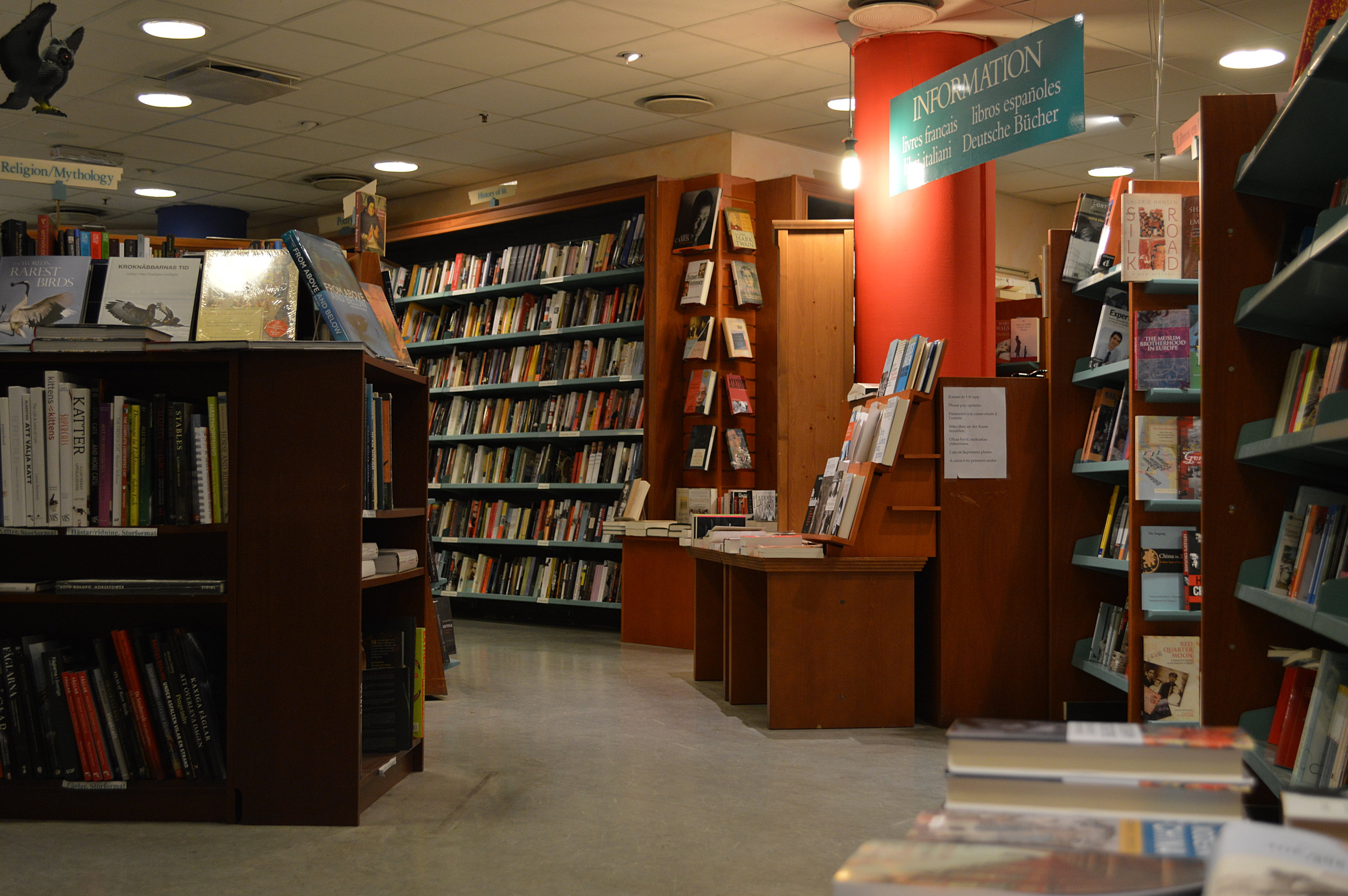 Interiörbild från den internationella avdelningen i den undre våningen i Hedengrens bokhandel, belägen vid Stureplan i Stockholm, Sverige.